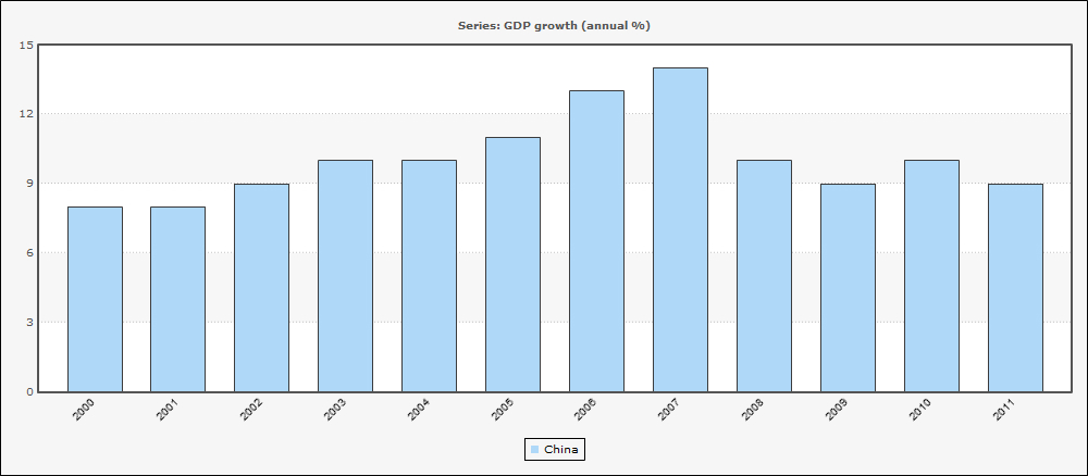 2000-2011中国GDP增长率（数据来自世界银行）